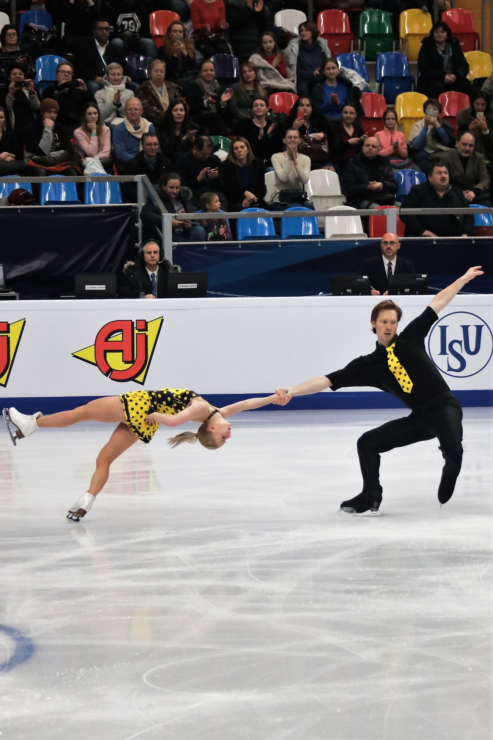 Евгения Тарасова / Владимир Морозов (Россия) на Чемпионате Европы по фигурному катанию 2018.